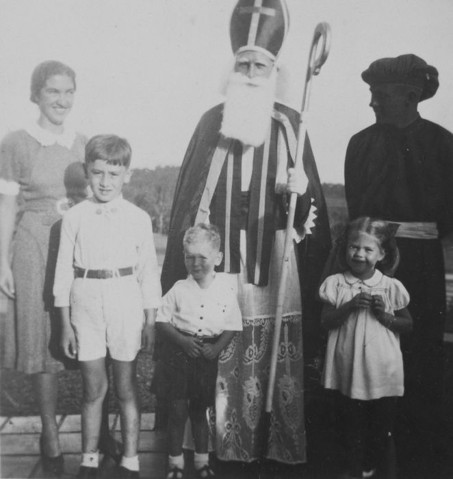 foto. Bezoek van Sinterklaas en Zwarte Piet aan een Nederlandse familie